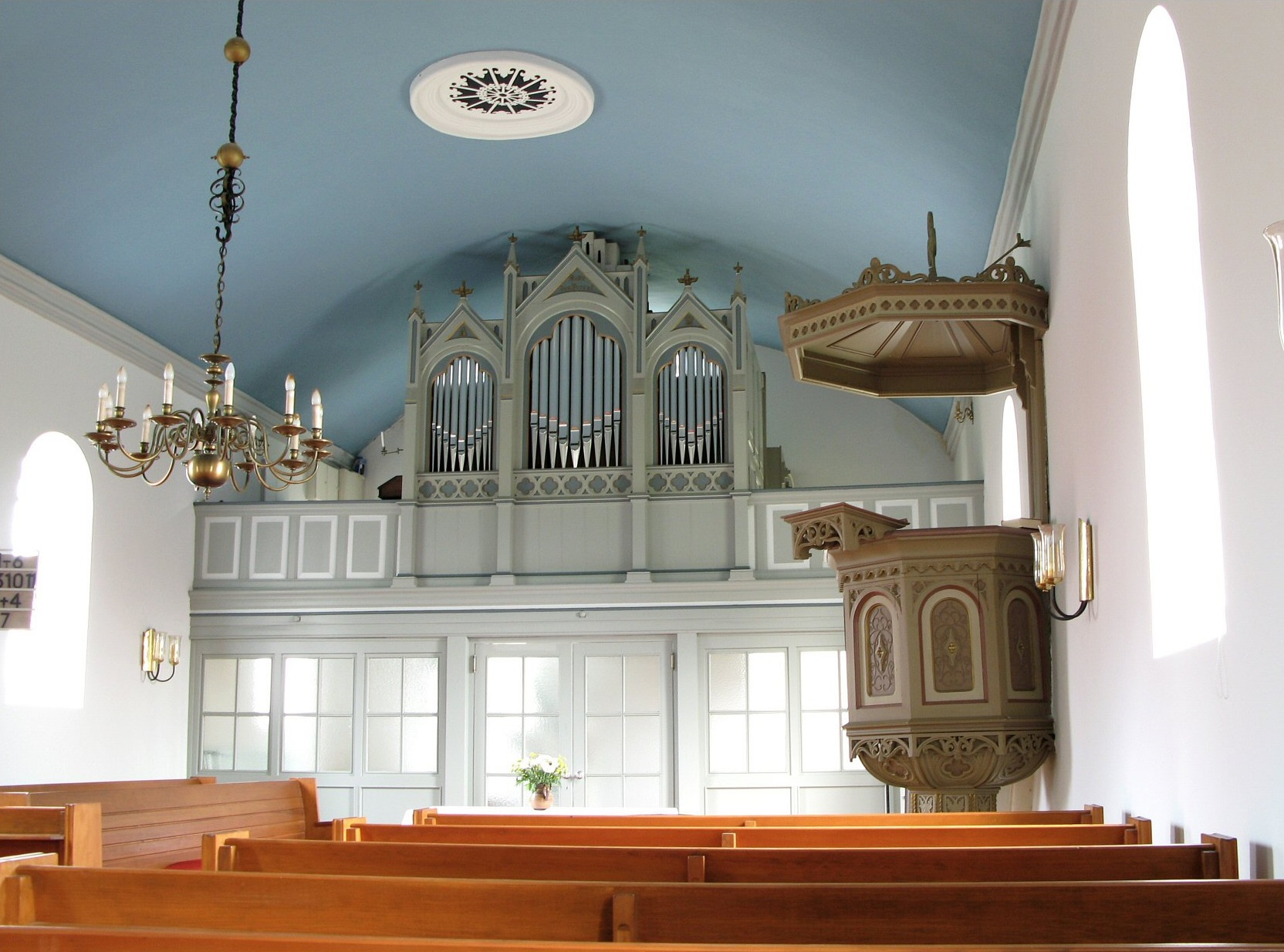 Orgel in Driever, Landkreis Leer